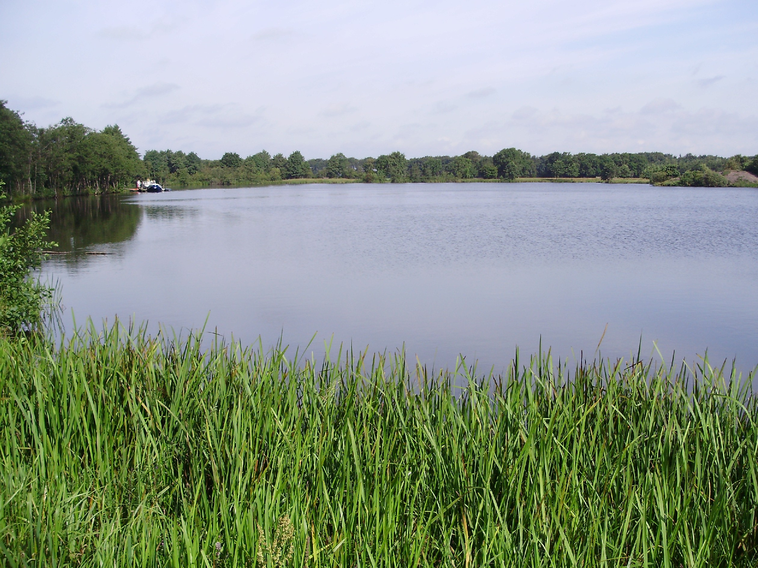 De Wyldemerk (Wildemerk) bij buurtschap Schouw in gemeente Gaasterlân-Sleat (provincie Friesland, Nederland)